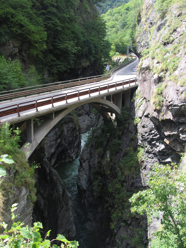 Ponte sul Torrente Mastallone